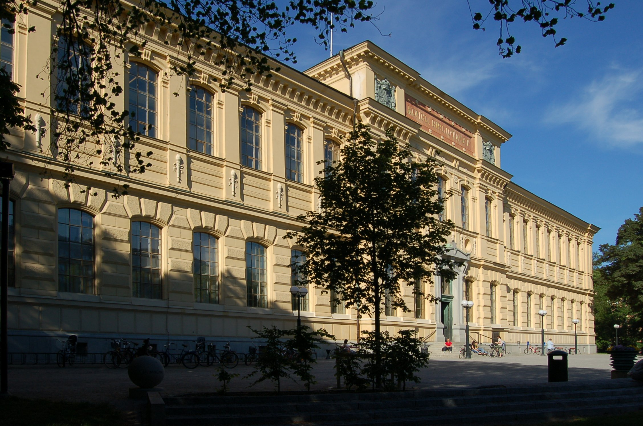 Entresidan av Kungliga biblioteket i Stockholm